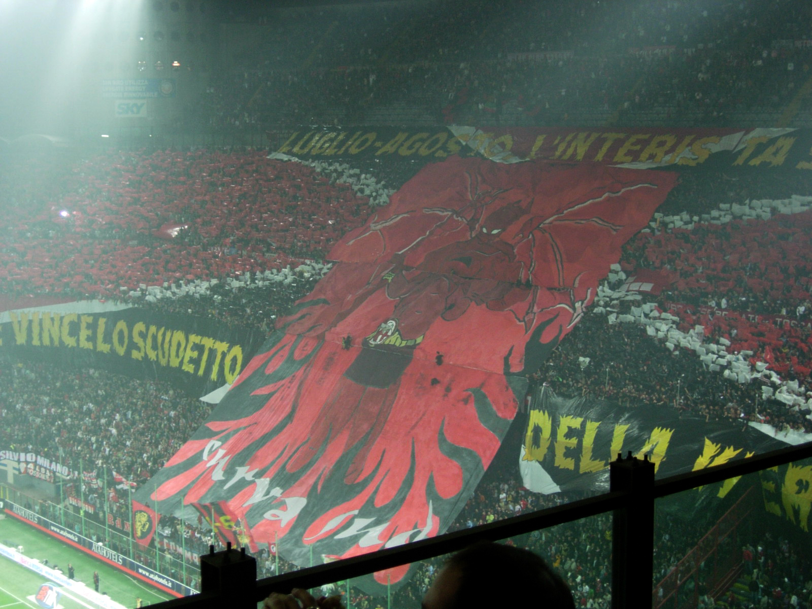 2006年10月28日米兰德比中的AC米兰球迷